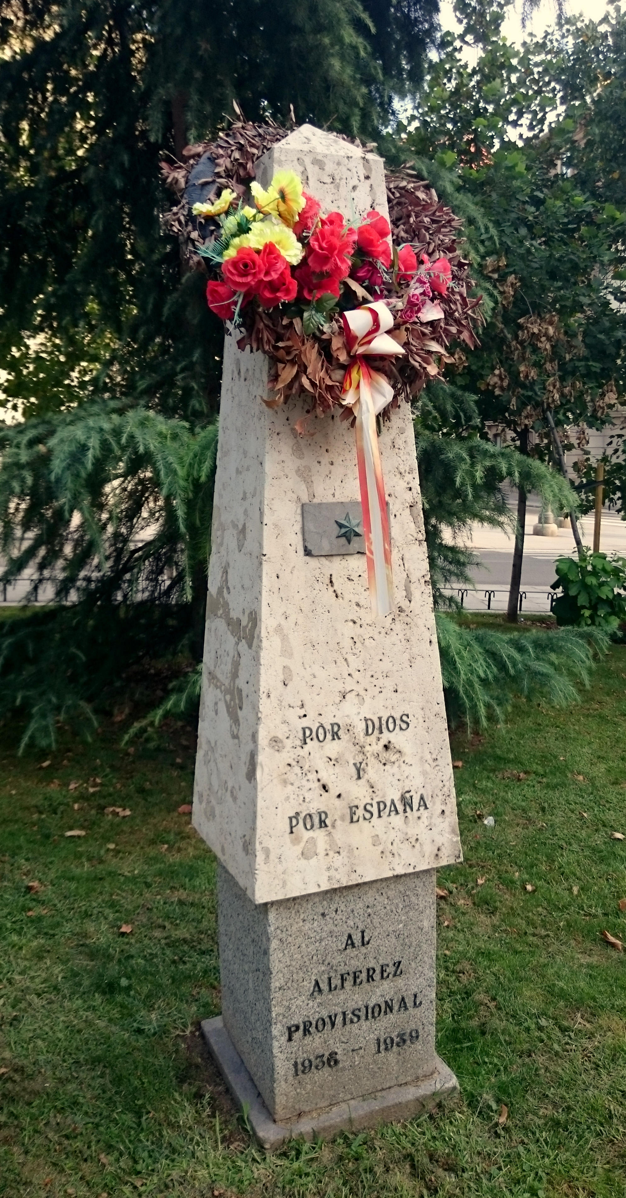 Monolito al Alférez Provisional en la zona ajardinada situada entre la calle de Felipe IV y la calle Méndez Núñez